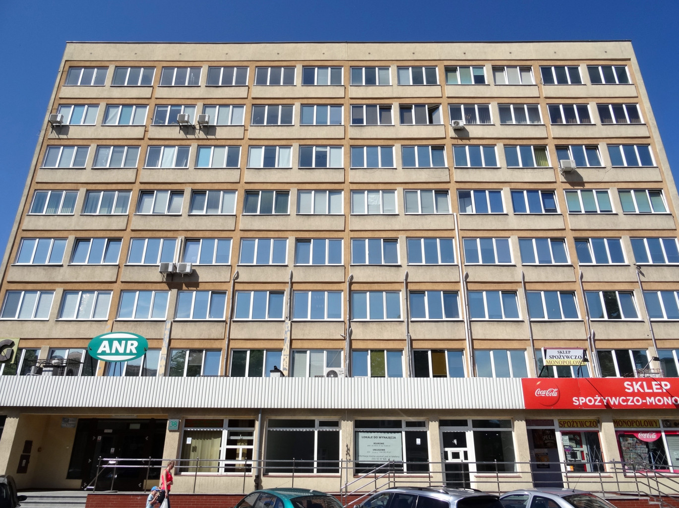 Biurowiec przy ul. Hetmańskiej 38 w Bydgoszczy, mieści m.in. kujawsko-pomorski oddział terenowy Agencji Nieruchomości Rolnych oraz Polską Izbę Producentów Urządzeń i Usług na Rzecz Kolei